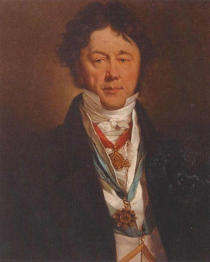 Ölgemälde von Ernst Friedrich Germar